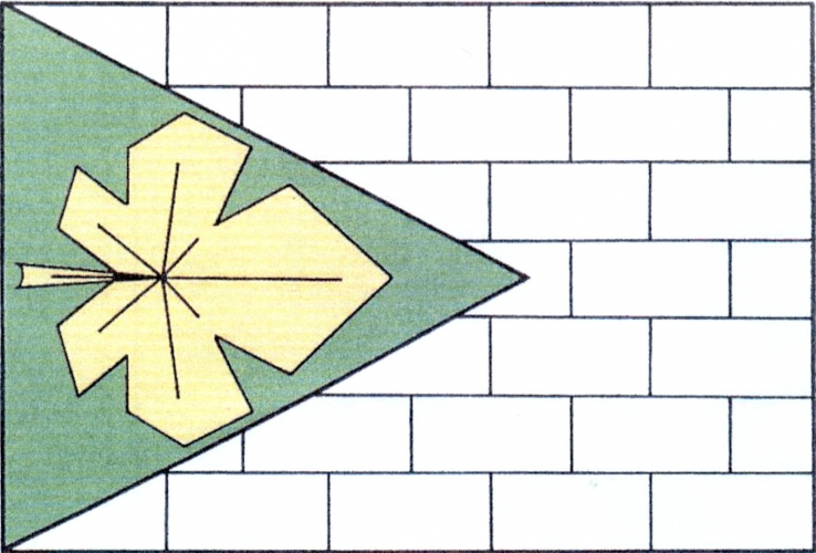 vlajka, Javorek, okres Žďár nad Sázavou